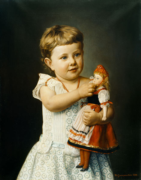 Olga Graupenstein, Enkeltochter von Friedrich Wilhelm Graupenstein